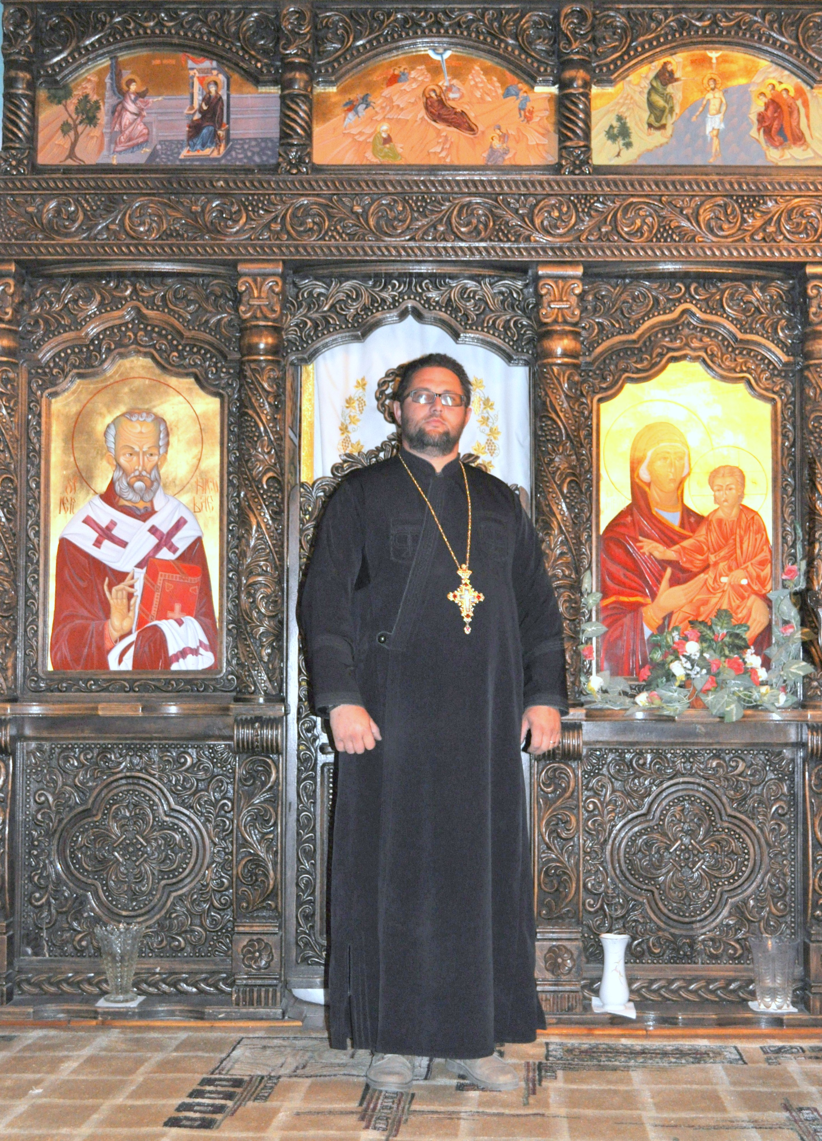 Avram Iancu, județul Arad